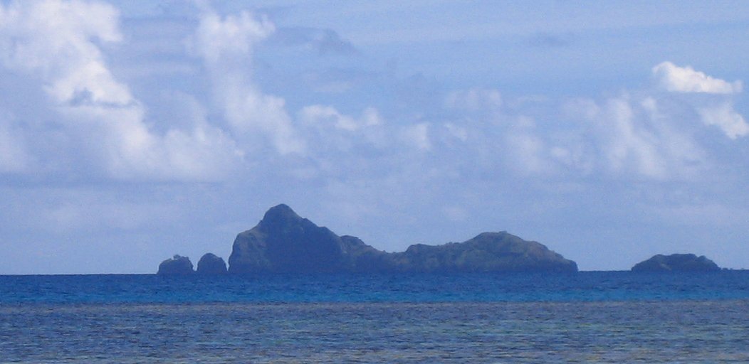 Photo de Makaroa aux îles Gambier en Polynésie française